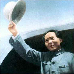 1945年8月，毛泽东赴重庆谈判，在飞机上向欢送的延安军民挥手告别